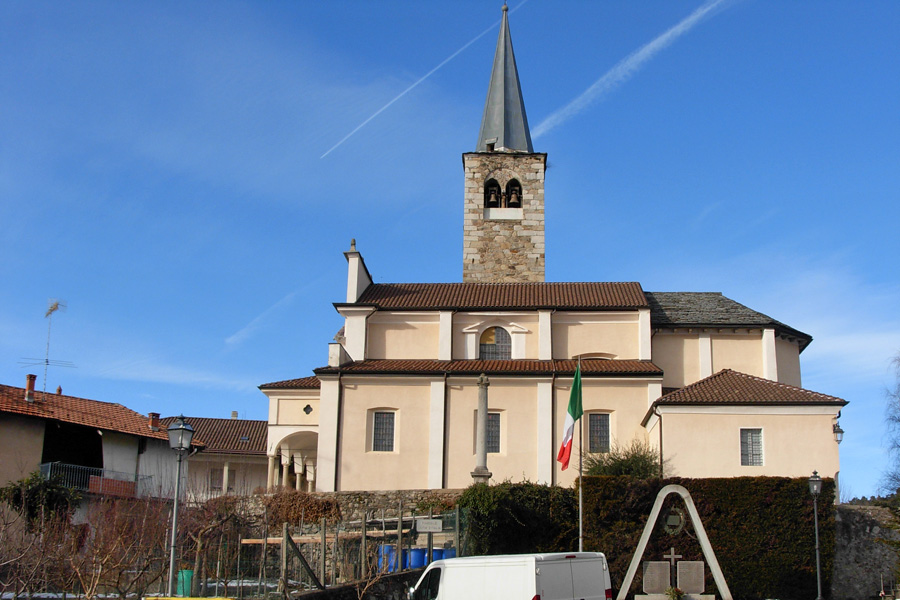 Chiesa parrocchiale di Bolzano Novarese